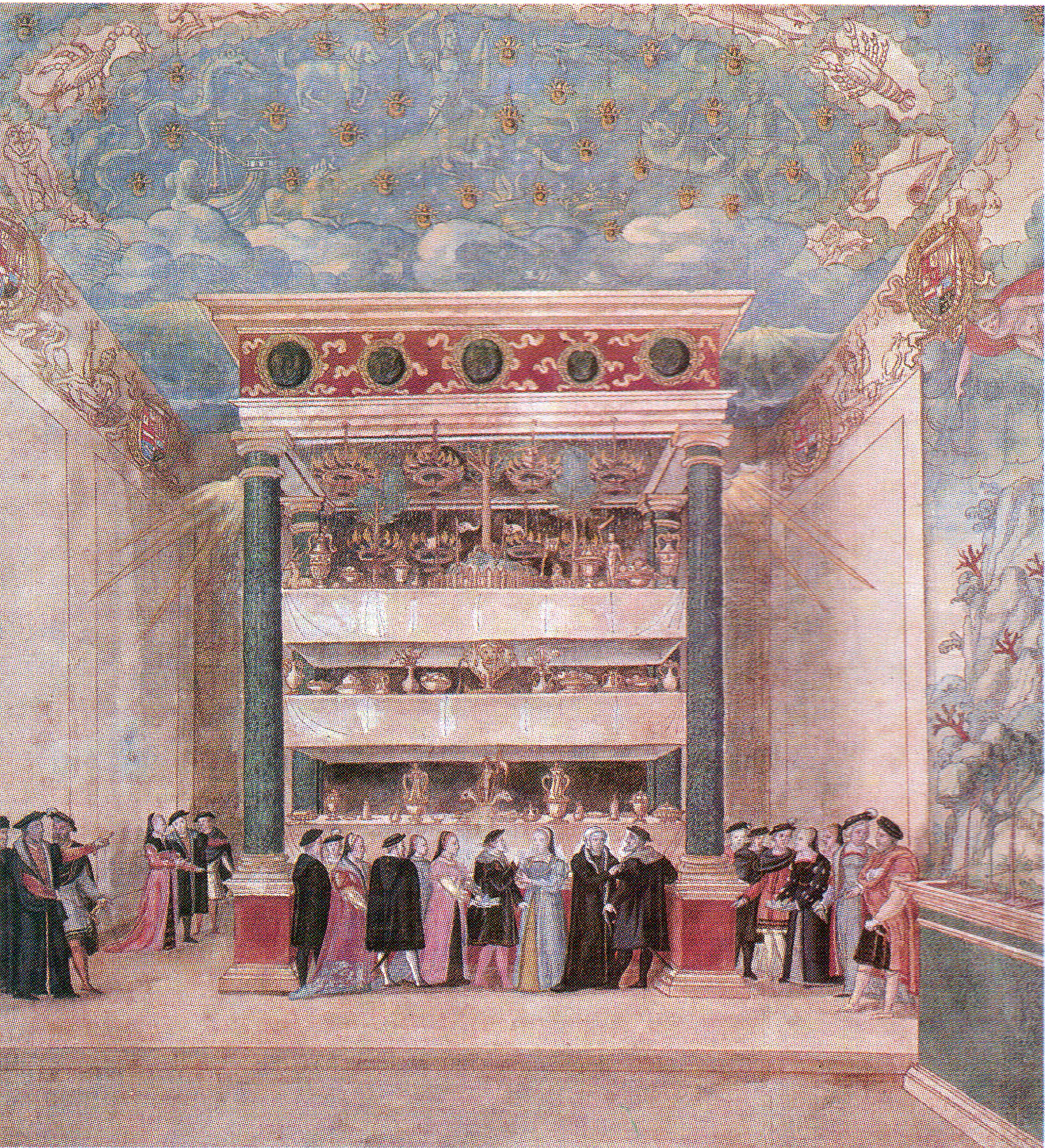 la "salle enchantée" du palais de binche aménagée pour un banquet lors des triomphes de binche organisé par marie de hongrie en 1549. actuelement à la bibliothèque royale de bruxelles